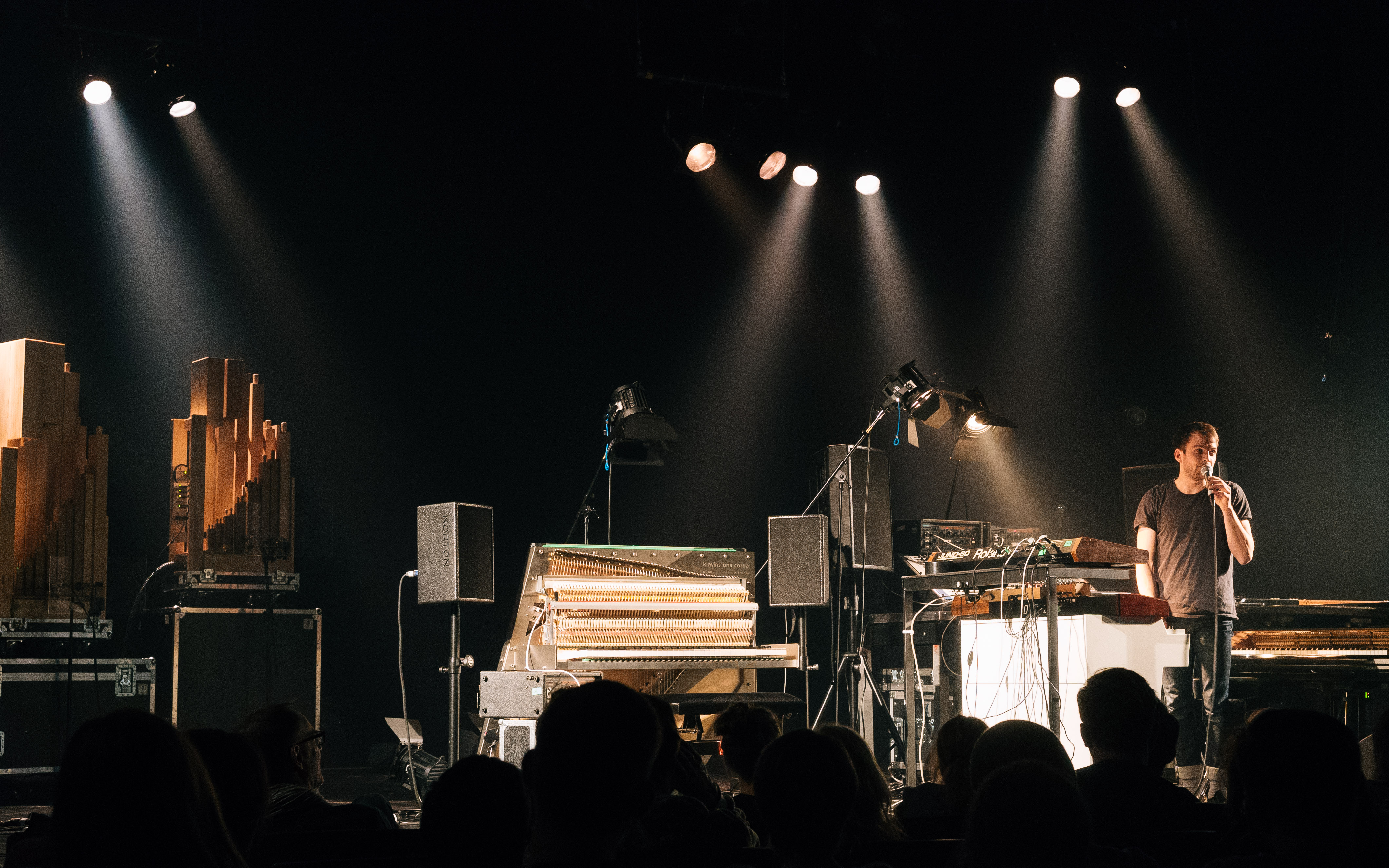 Nils Frahm bei seinem Konzert am 28.04.2015 in der Volkbühne